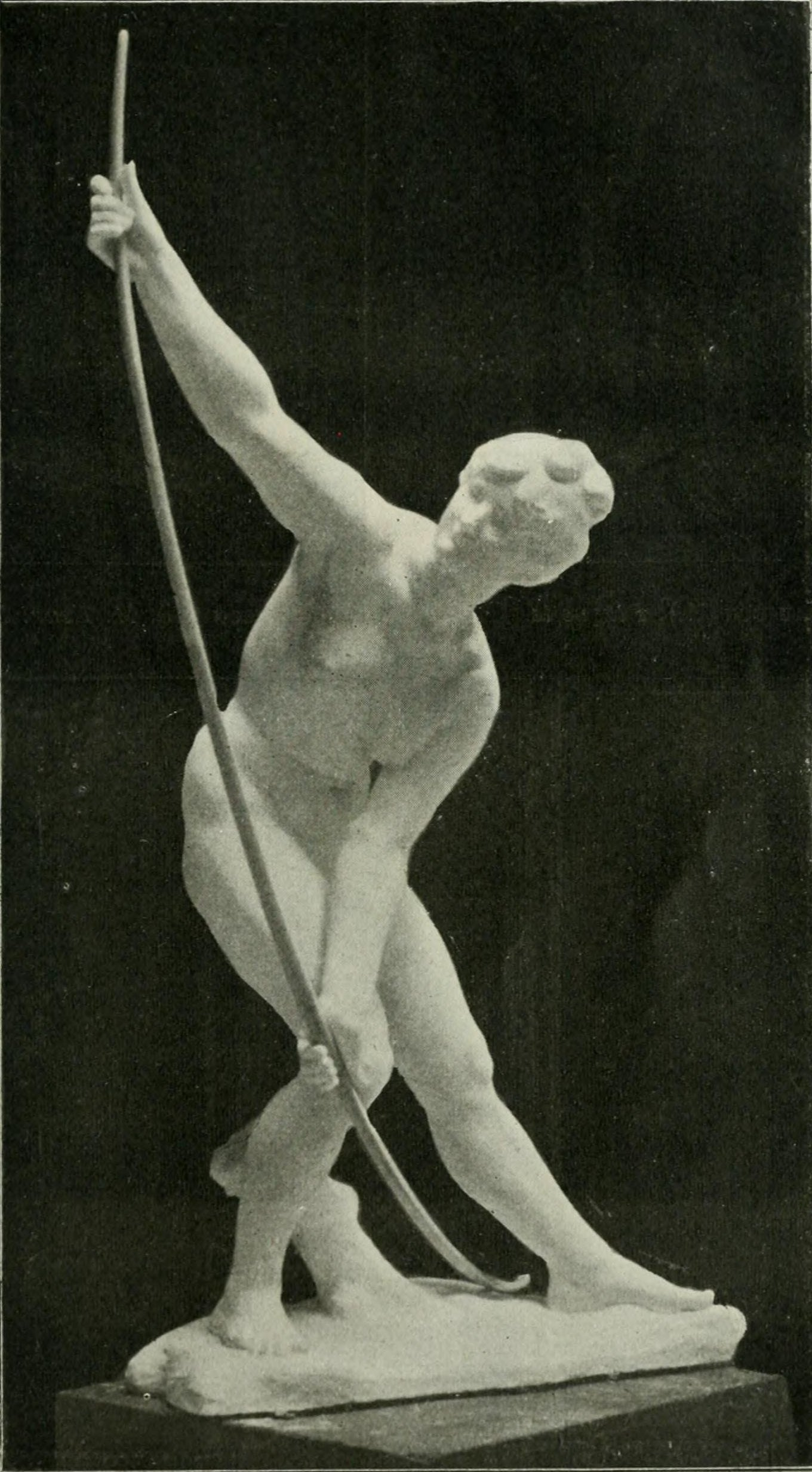 Femme à l'arc